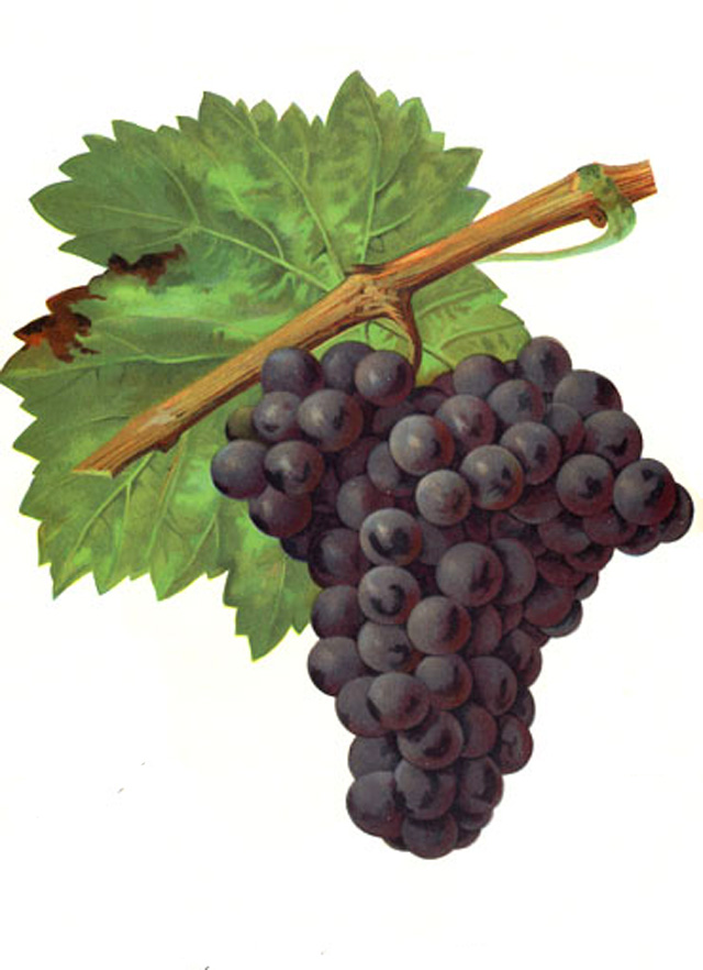 Illustration du cépage Tinta amarella par Alexis Kreyder dans l'ouvrage "Ampélographie : traité général de viticulture" publié sous la direction de P. Viala & V. Vermorel avec la collaboration de A. Bacon, A. Barbier, A. Berget [et al.] - Date de l'édition originale : 1901-1910